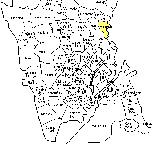 København Amt, Sokkelund Herred, Sogn